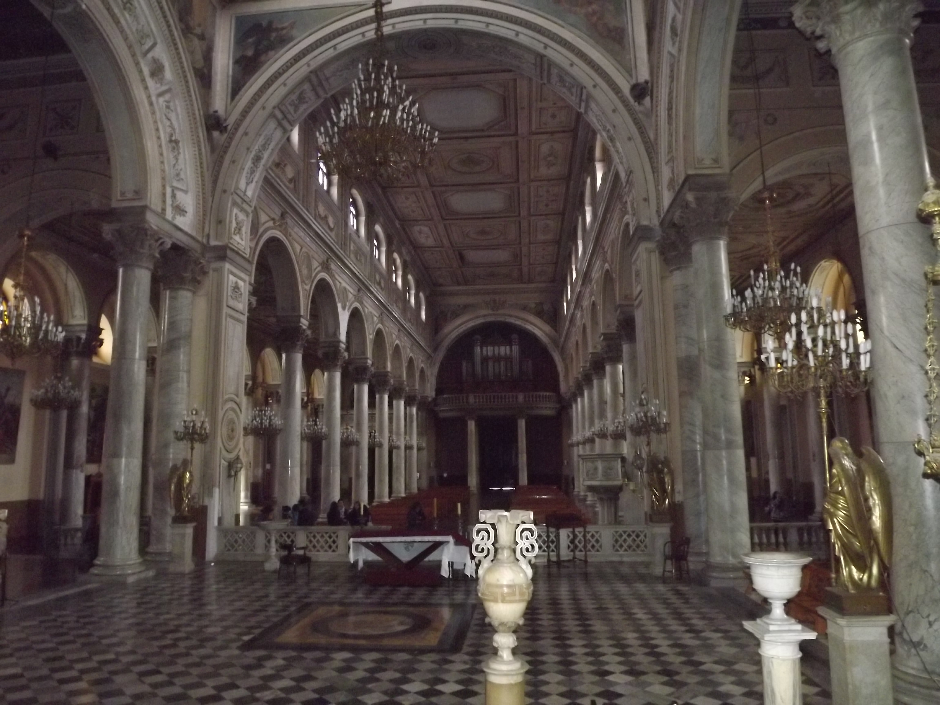 Interior de la Iglesia de la Recoleta Domínica This is a photo of a national monument in Chile: 229